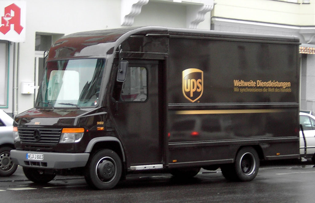 UPS-Lieferwagen